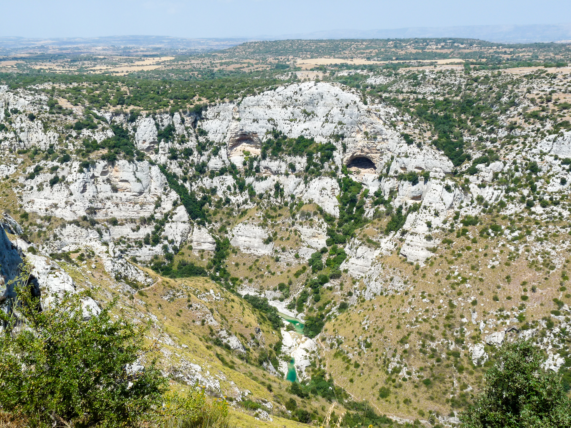 Avola, Cava Grande del Cassibile